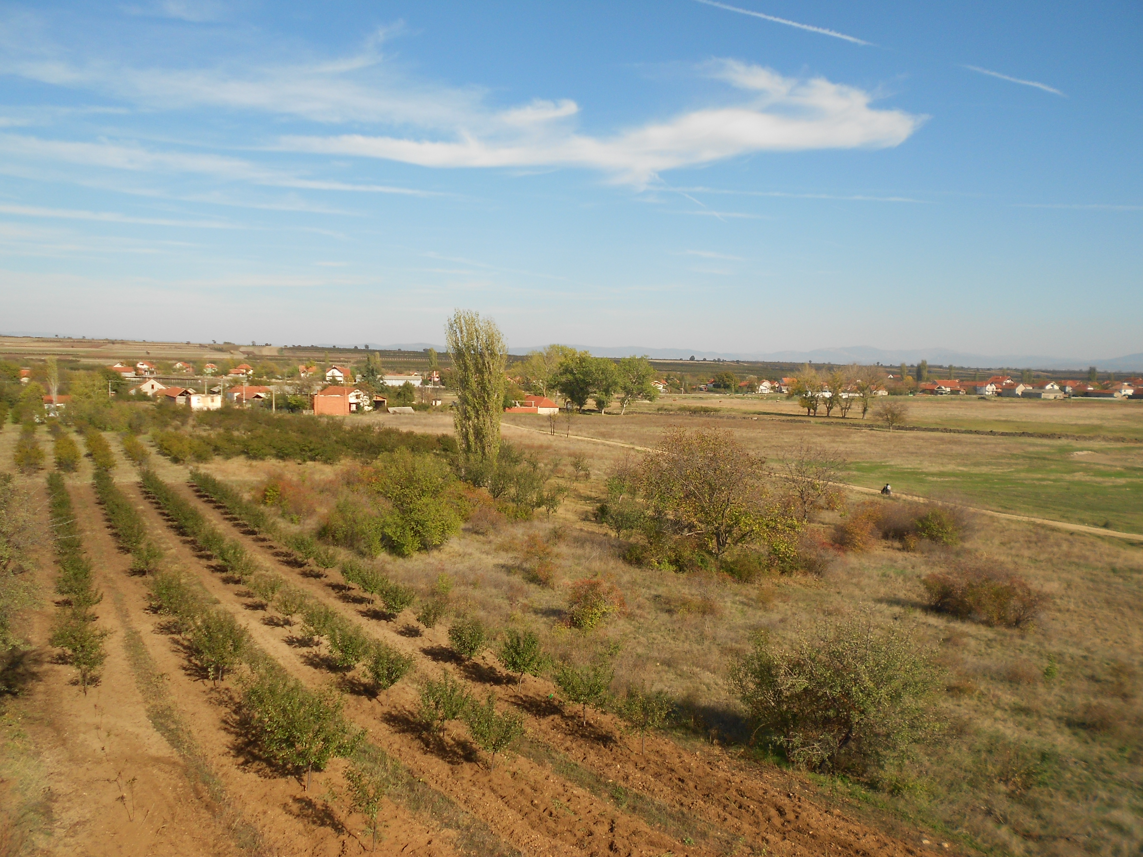 Драган Цветковић Ниш Сопствена слика Облачина село погле из даљине